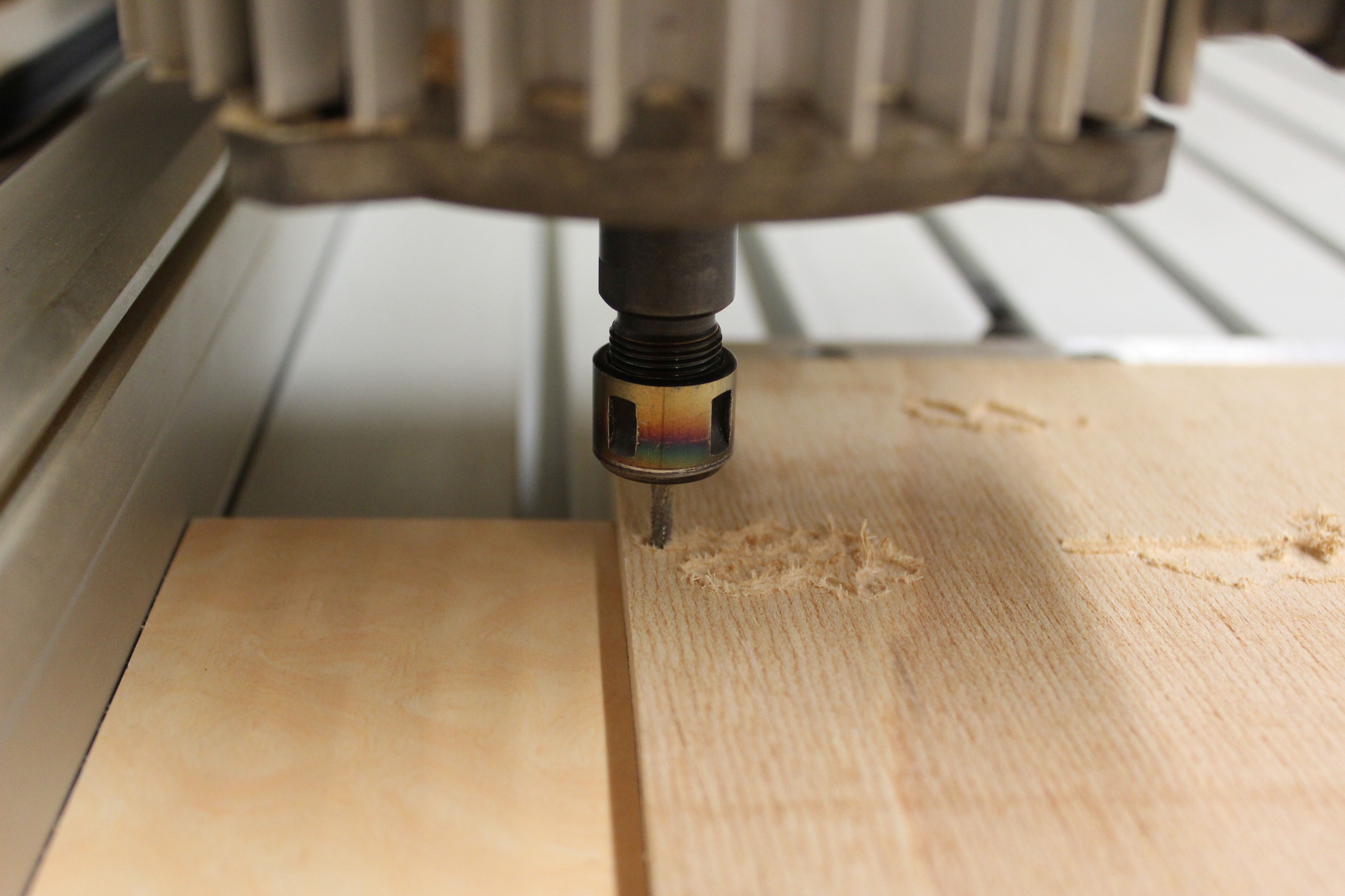 Das Bild zeigt eine CNC-Maschine während der Bearbeitung einer Holzplatte für einen 10-Farben-Holzschnitt. Man sieht die Frässpindel mit einem Stirnfräser, Durchmesser 3 mm.